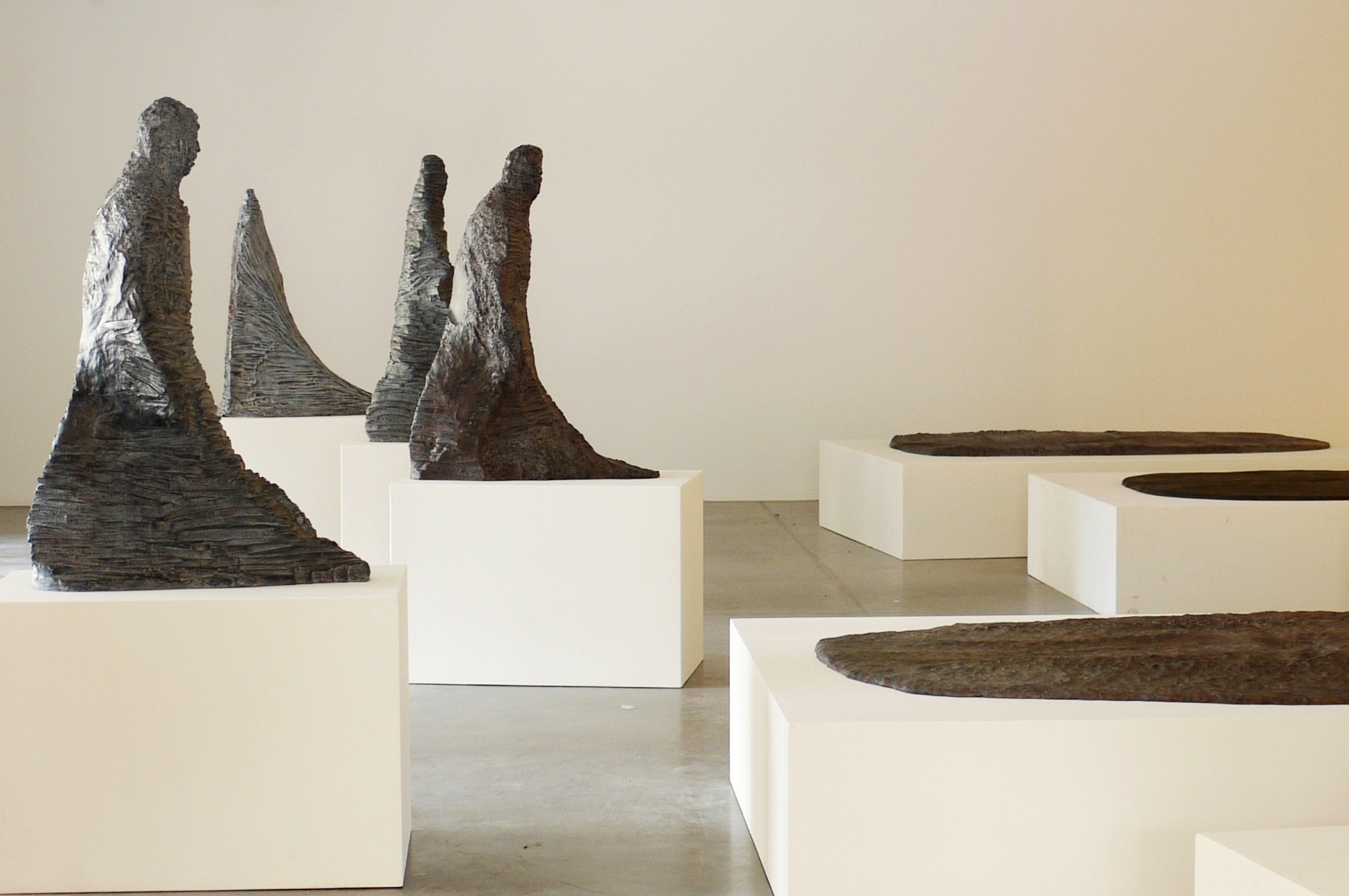 Vues de l'exposition "L'inconnu dans l'atelier", la Ferme Ornée, Yerres, 2013